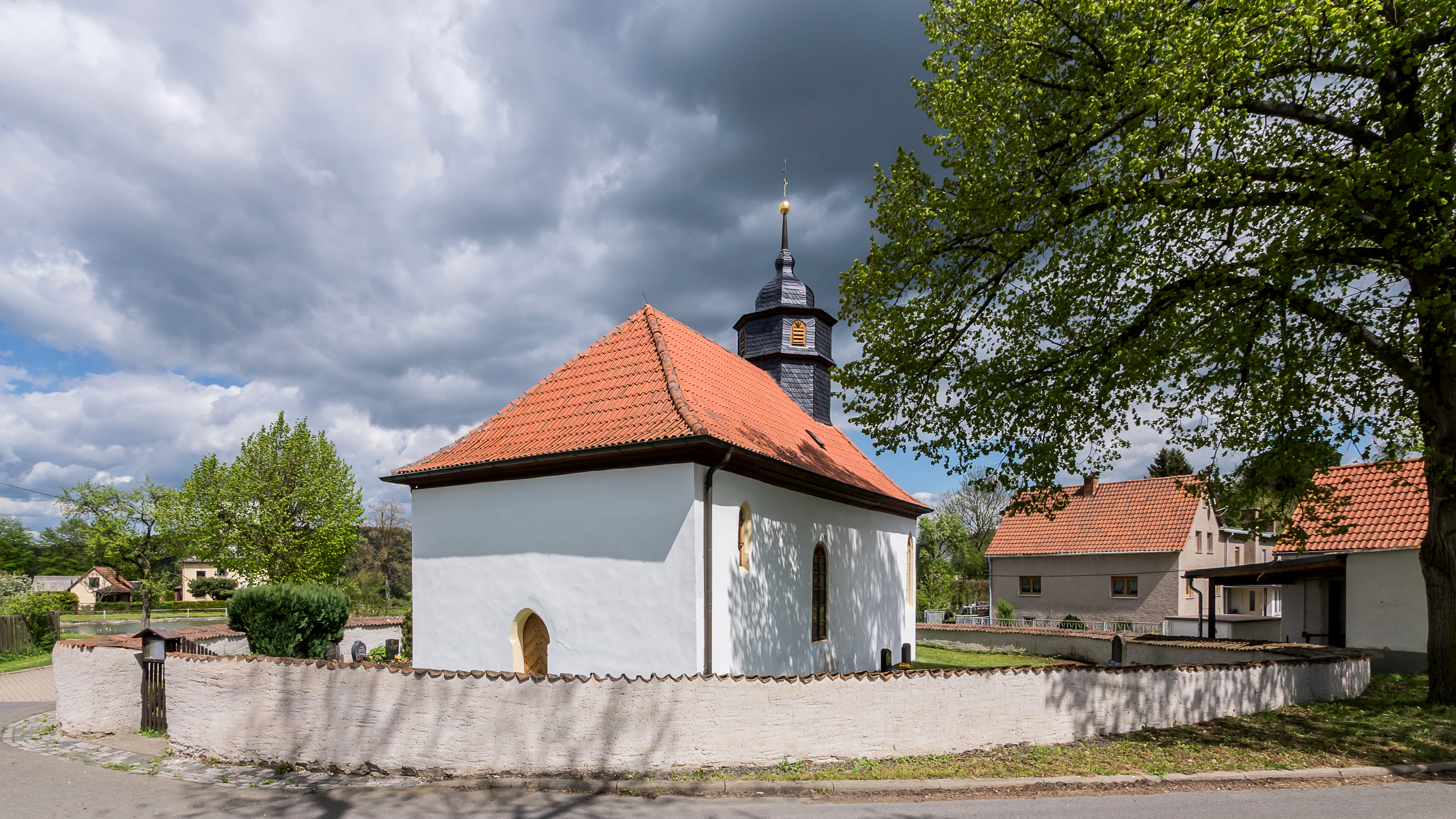 Neidenberga Anger Kirche mit Ausstattung, Friedhof und Einfriedung